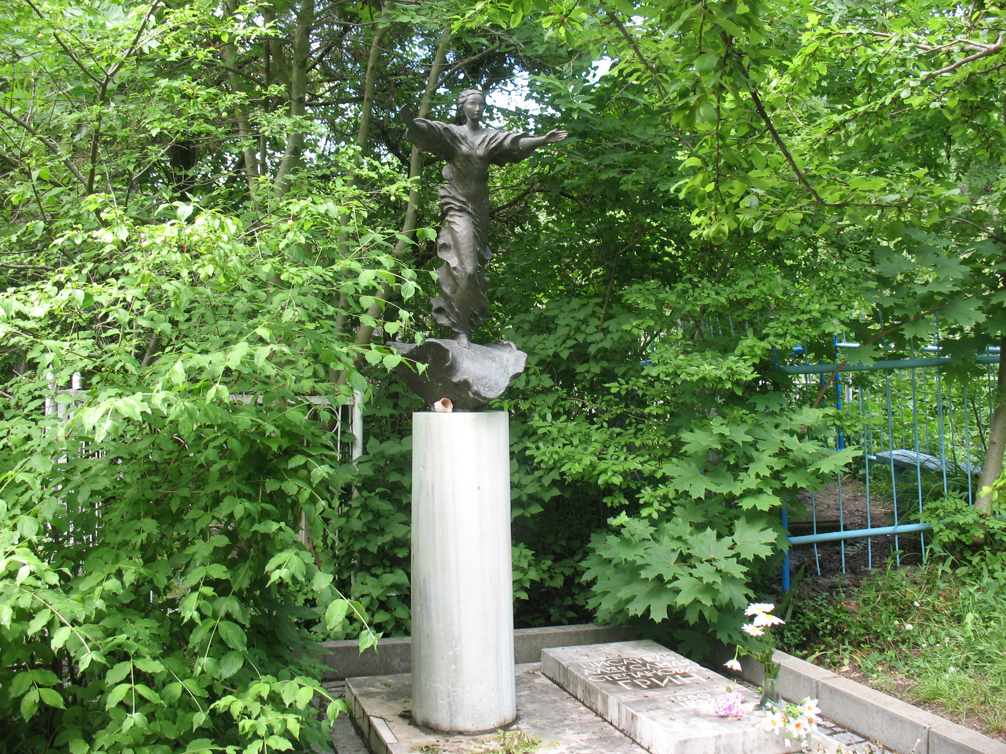 Могила Грина